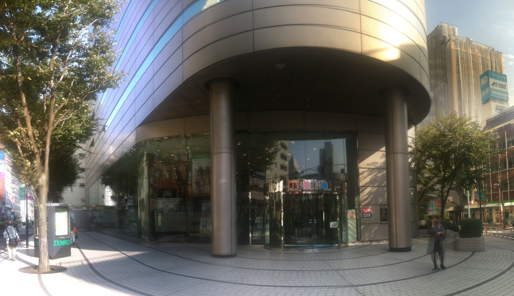 スペース・ゼロ（英語：SPACE ZERO）は、東京都渋谷区代々木二丁目にある多目的ホール、または同ホールを運営する株式会社スペース・ゼロの通称である。なお、ホールの正式名称は、全労済ホールスペース・ゼロである。